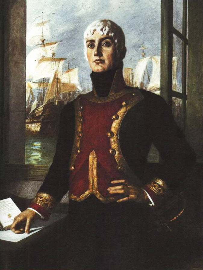 Retrato del marino español Cosme Damián Churruca (1761-1805), que fue brigadier de la Real Armada Española y murió en la batalla de Trafalgar, librada el día 21 de octubre de 1805. La obra se conserva en una colección particular de Madrid, (España).